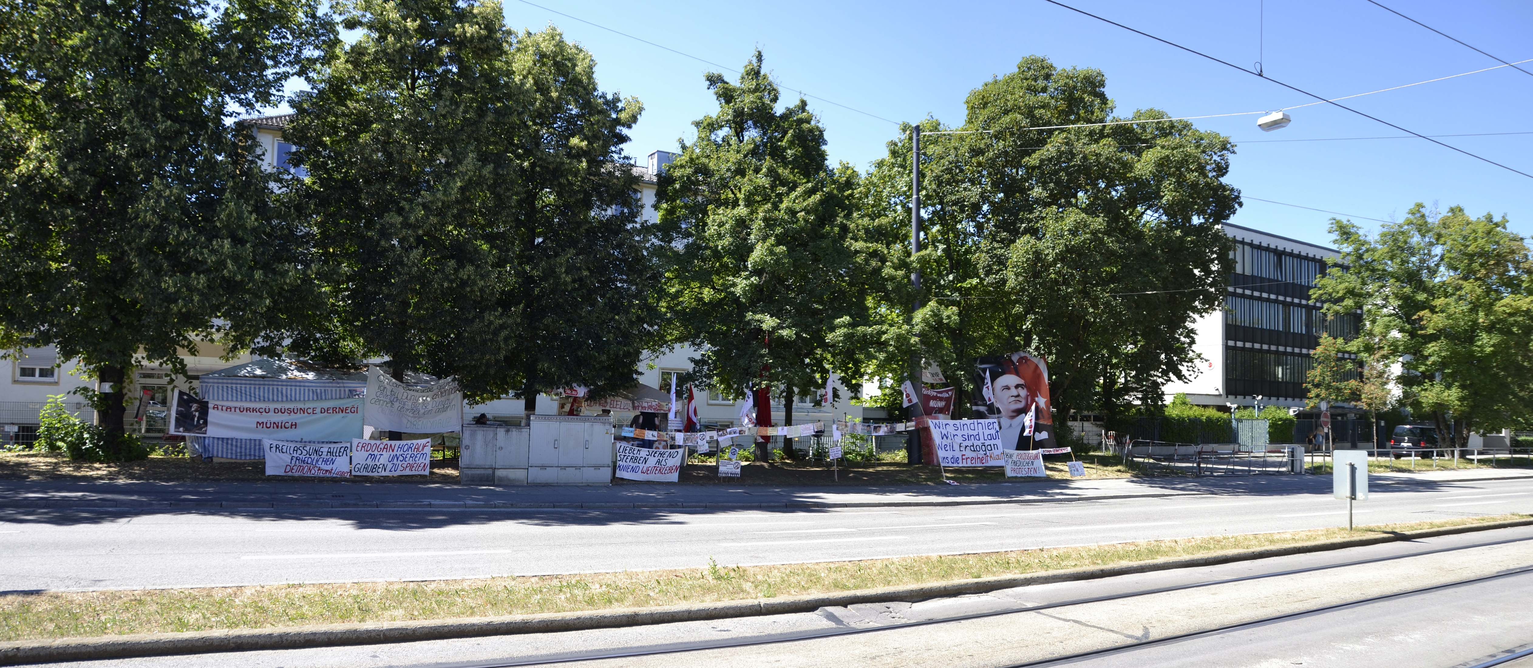 Taksim-Gezi-Park-Unterstützer vor dem türkischen Generalkonsulat in München im Sommer 2013.